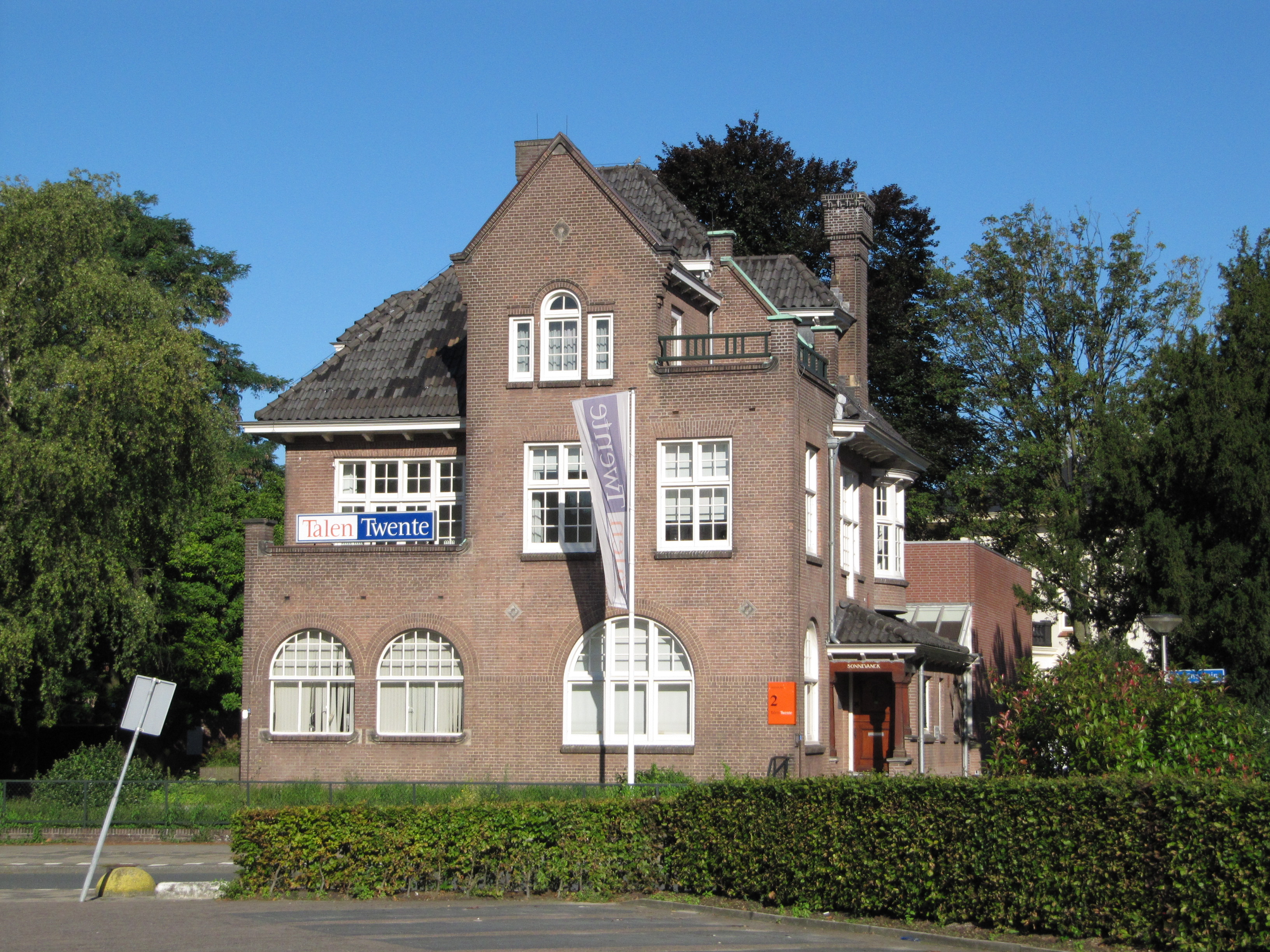 RM510625_-_Enschede_-_Ariensplein_2